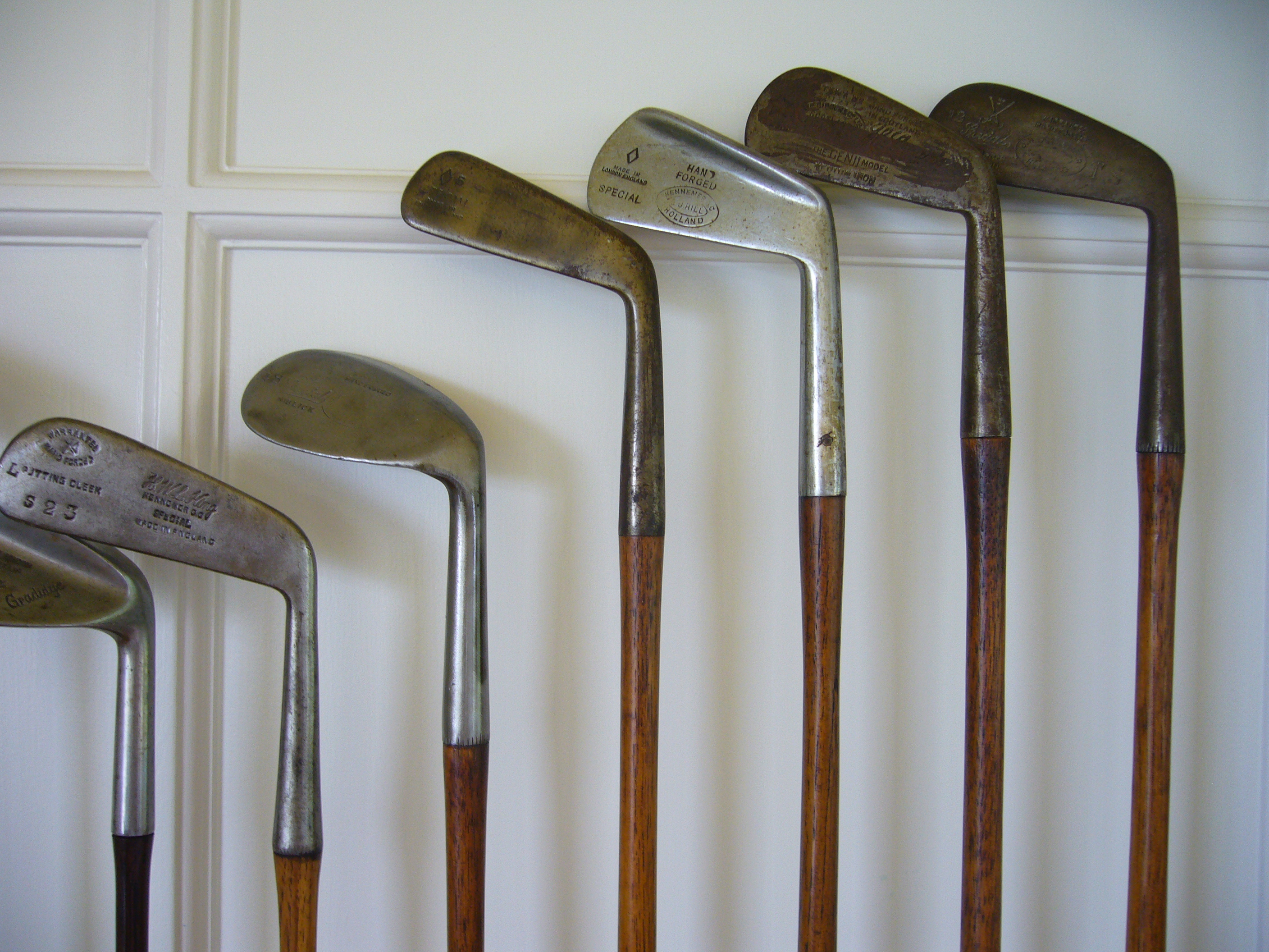 Hickory golfstokken